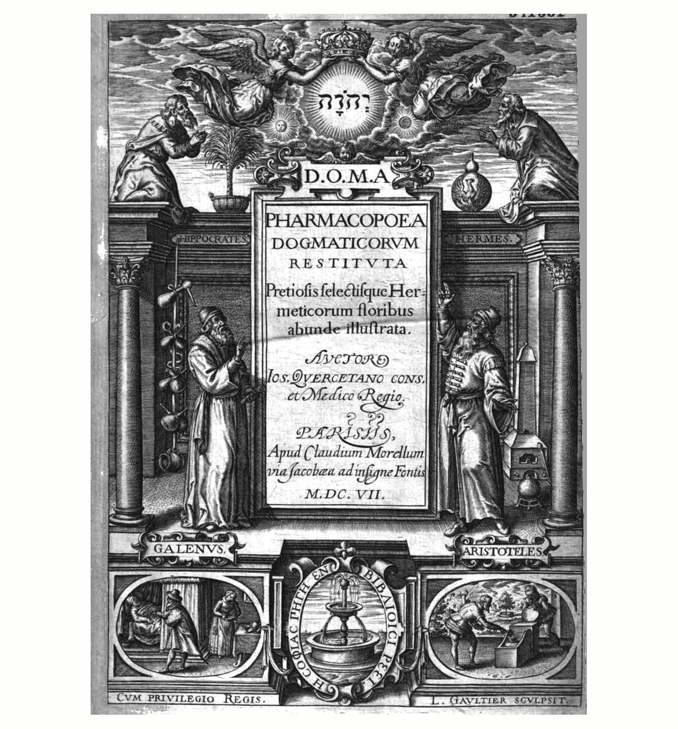 Titelbild